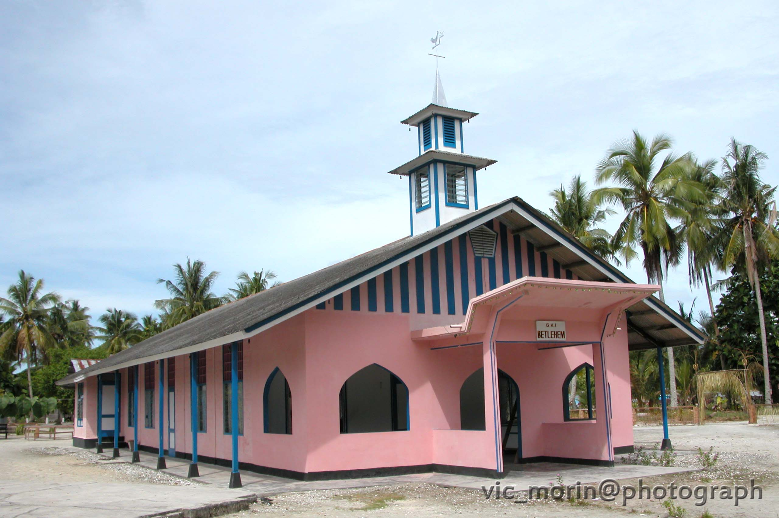 Betlehem Church at Wundi